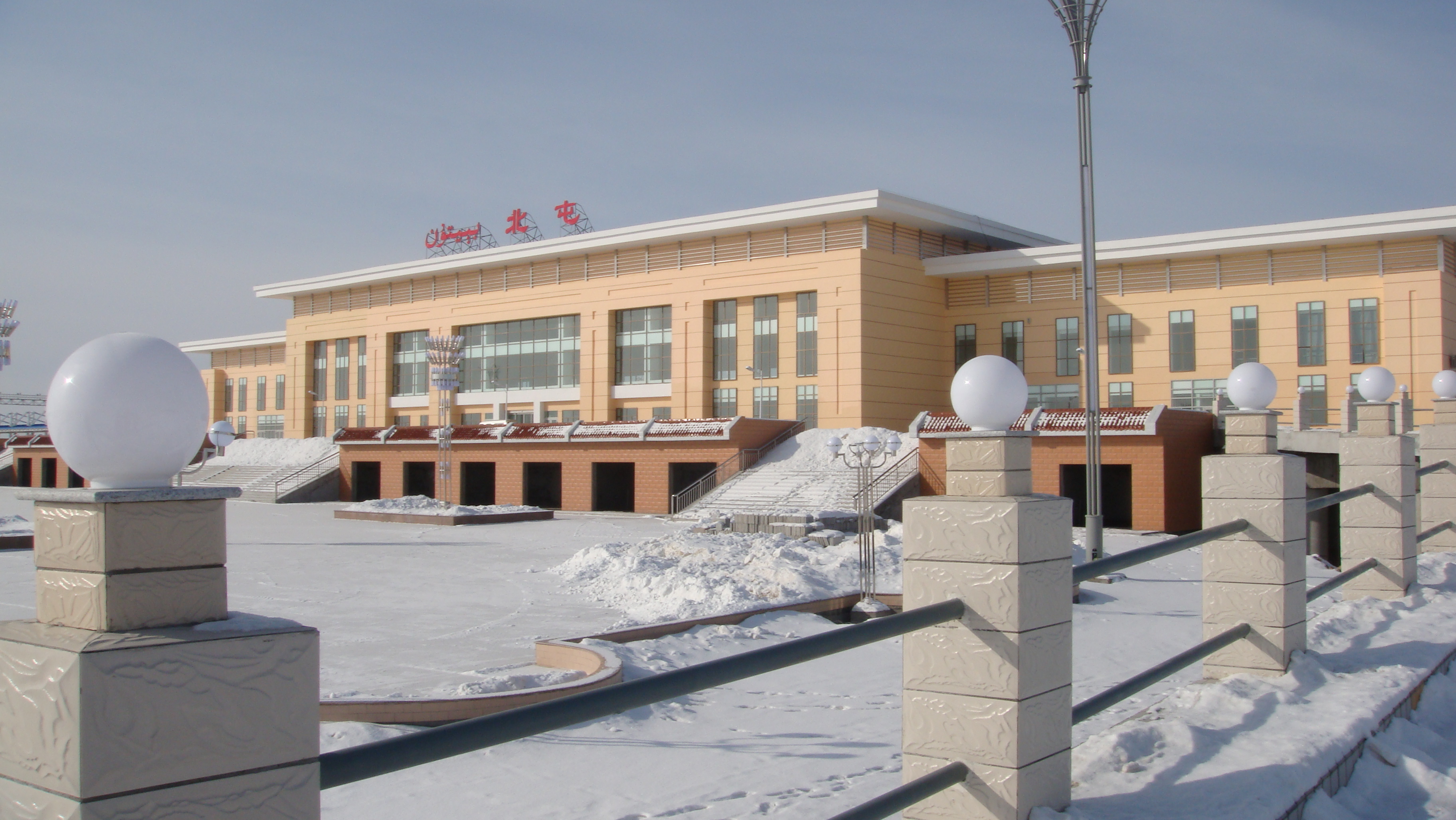 北屯火车站2011年2月6日 余华峰